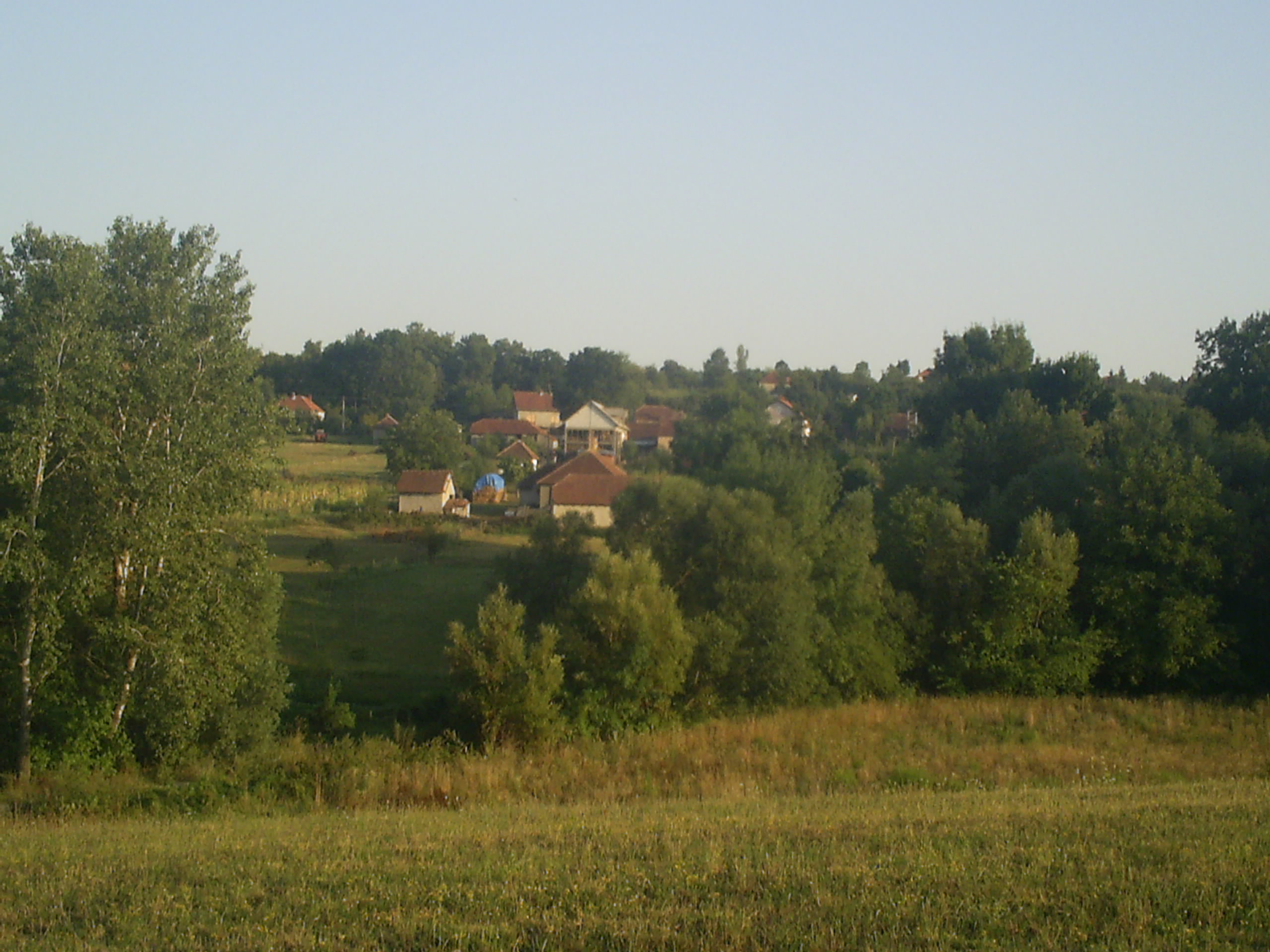 Поглед на Доброводицу